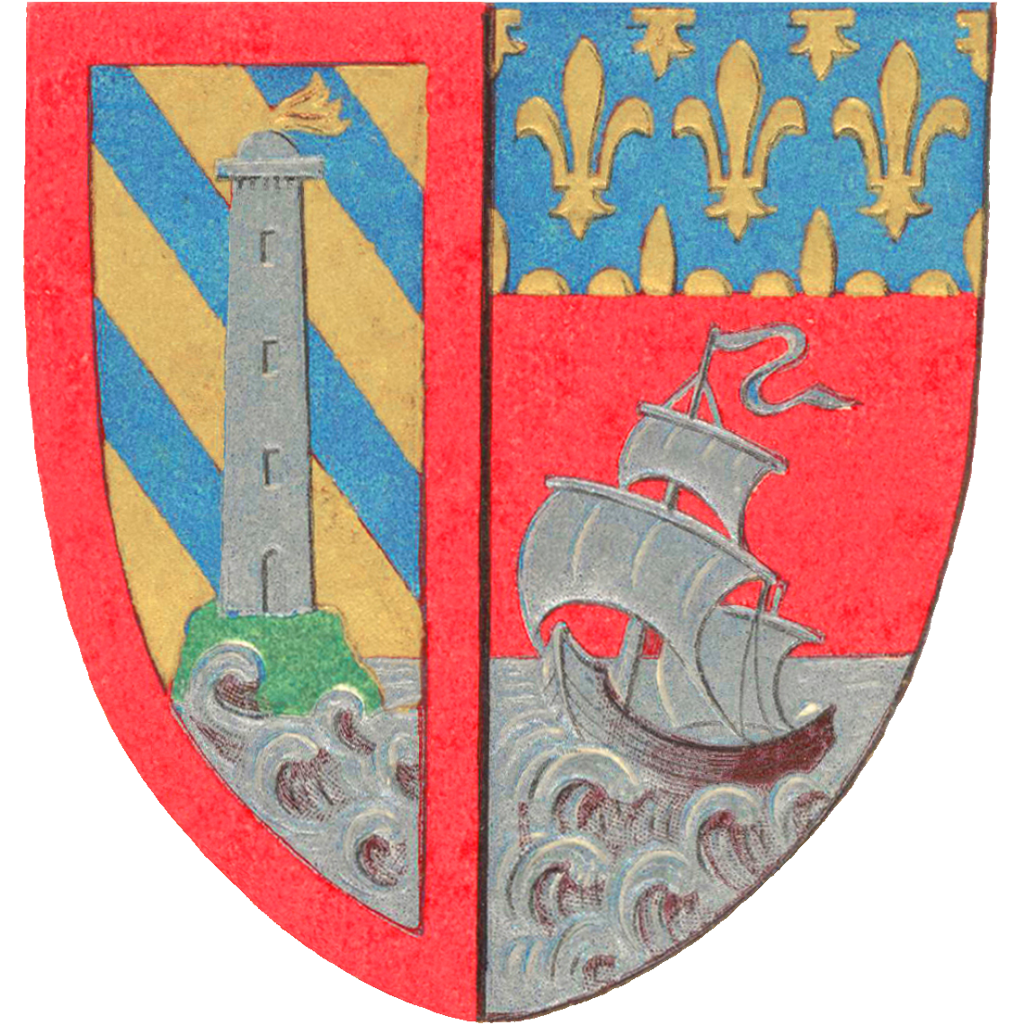 Blason du Touquet-Paris-Plage tiré des armoiries dessinés en 1894 par Robert de Guyencourt